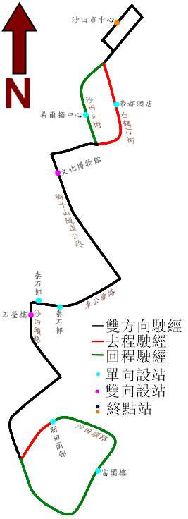 中文（香港）: 九巴282線的走線圖